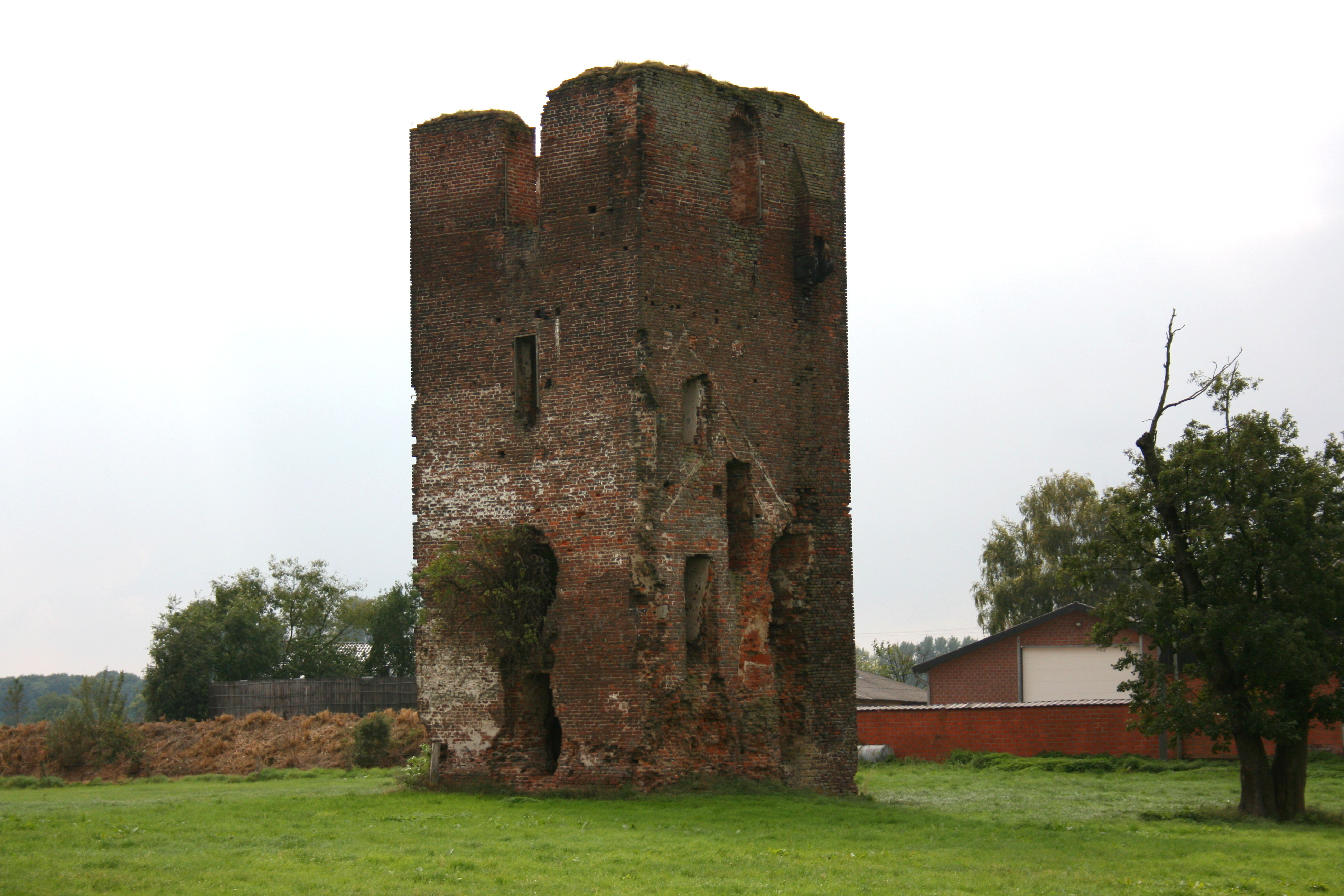 Haus Langendonk in Geldern-Aengenesch